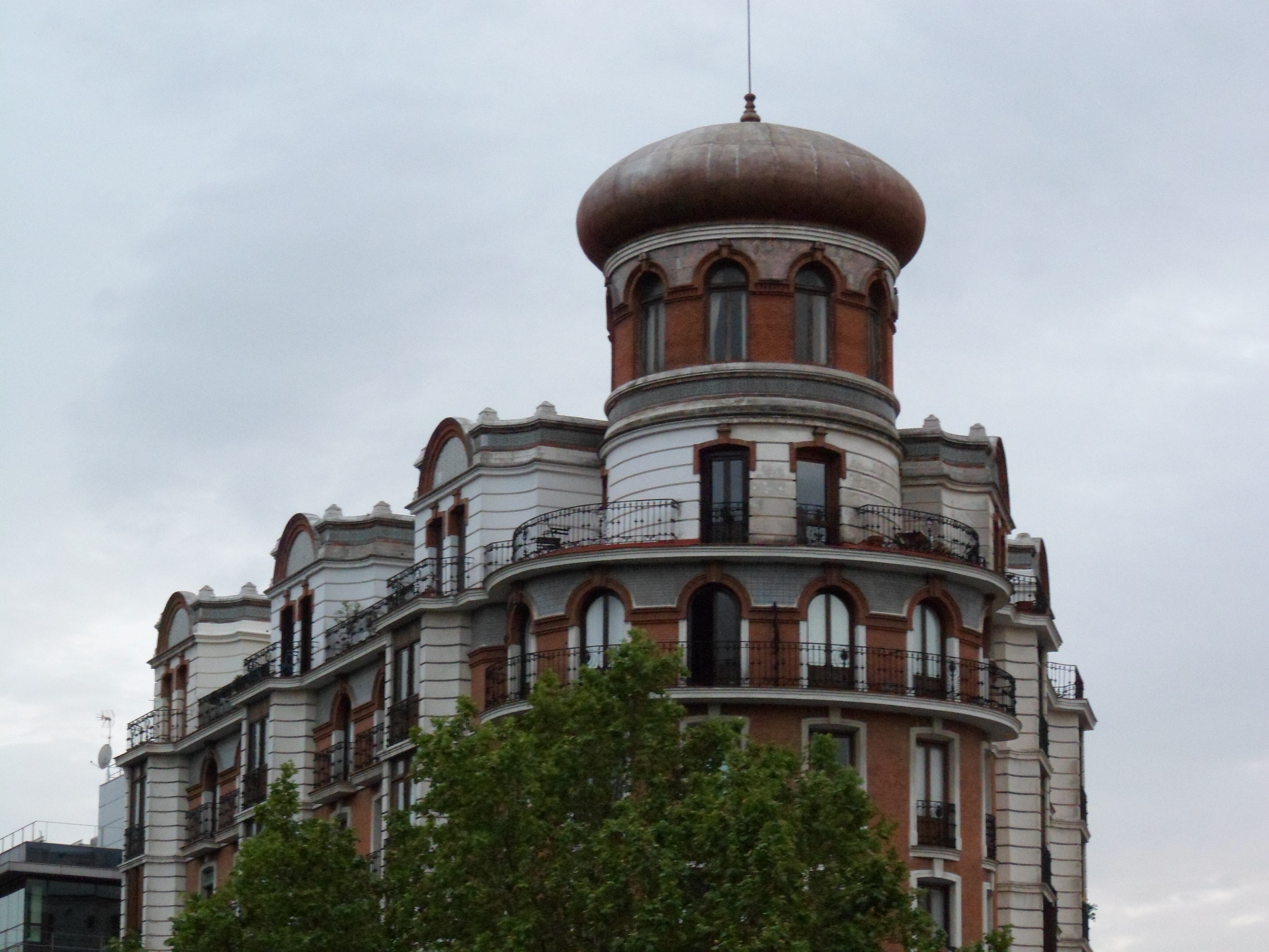 El edificio Críspulo Moro, situado en la esquina entre las calles Alfonso XII y Doctor Velasco de Madrid. Diseñado por el arquitecto Críspulo Moro